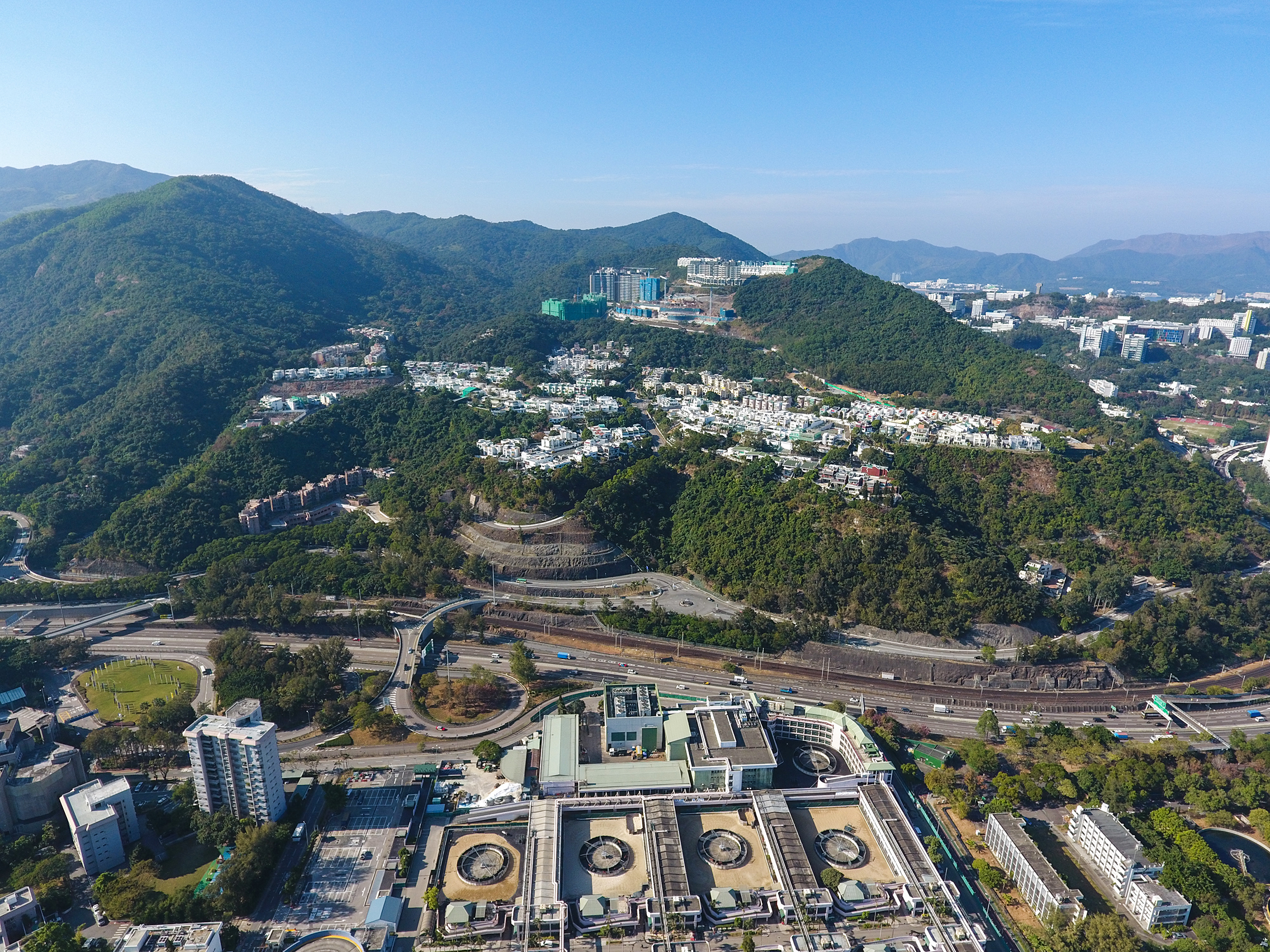 Kau To Shan